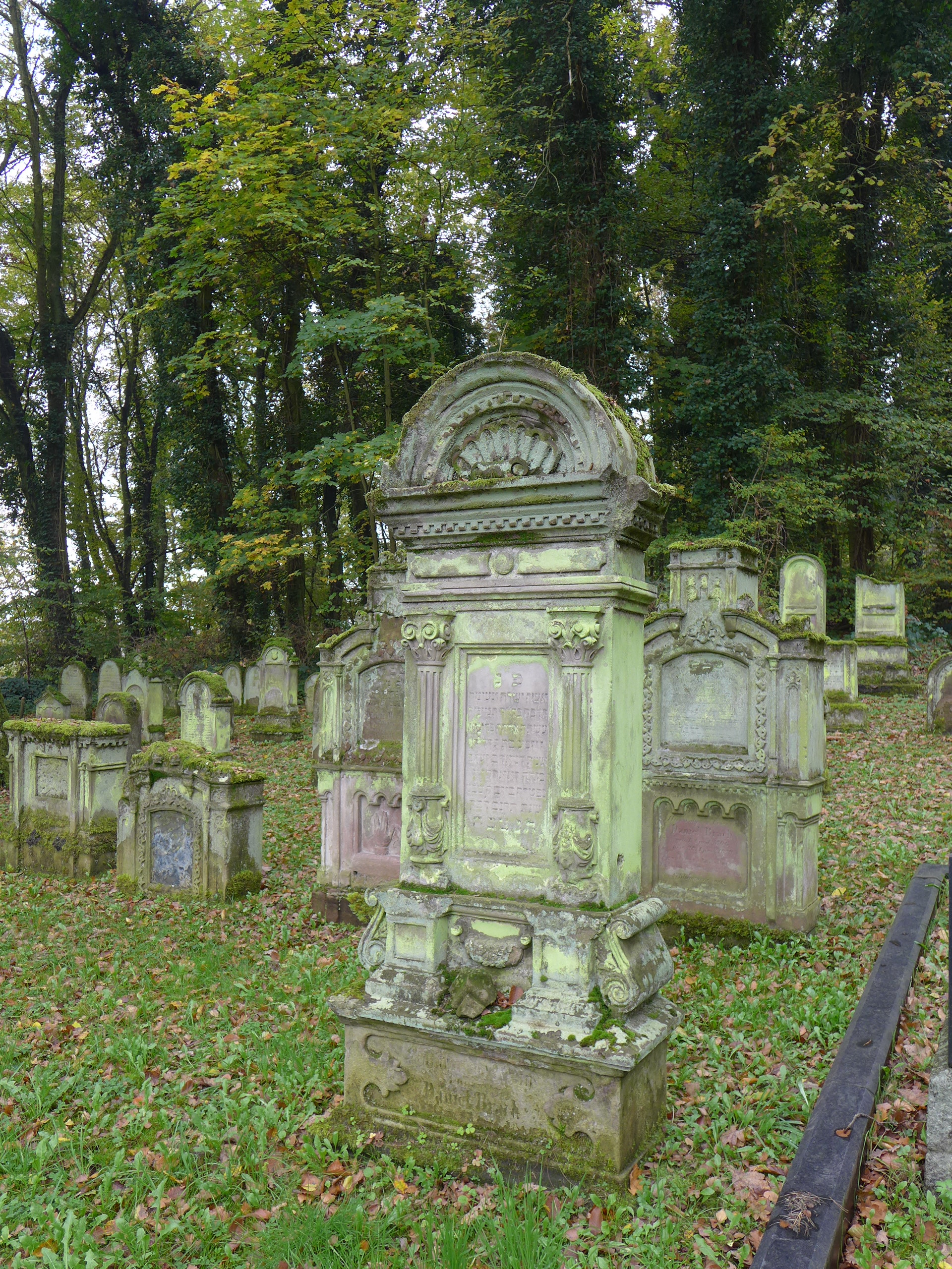 Diefflen, Jüdischer Friedhof